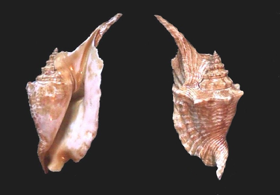 Strombus gallus del Archipiélago Los Roques, Dependencias Federales - Venezuela.